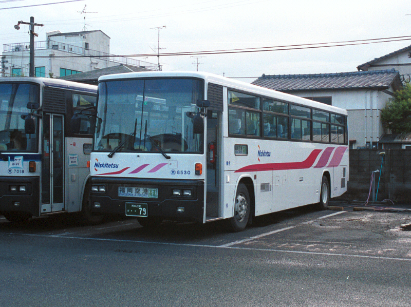 荒尾営業所にて、2002-4-12撮影